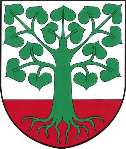 Klokočov HB znak